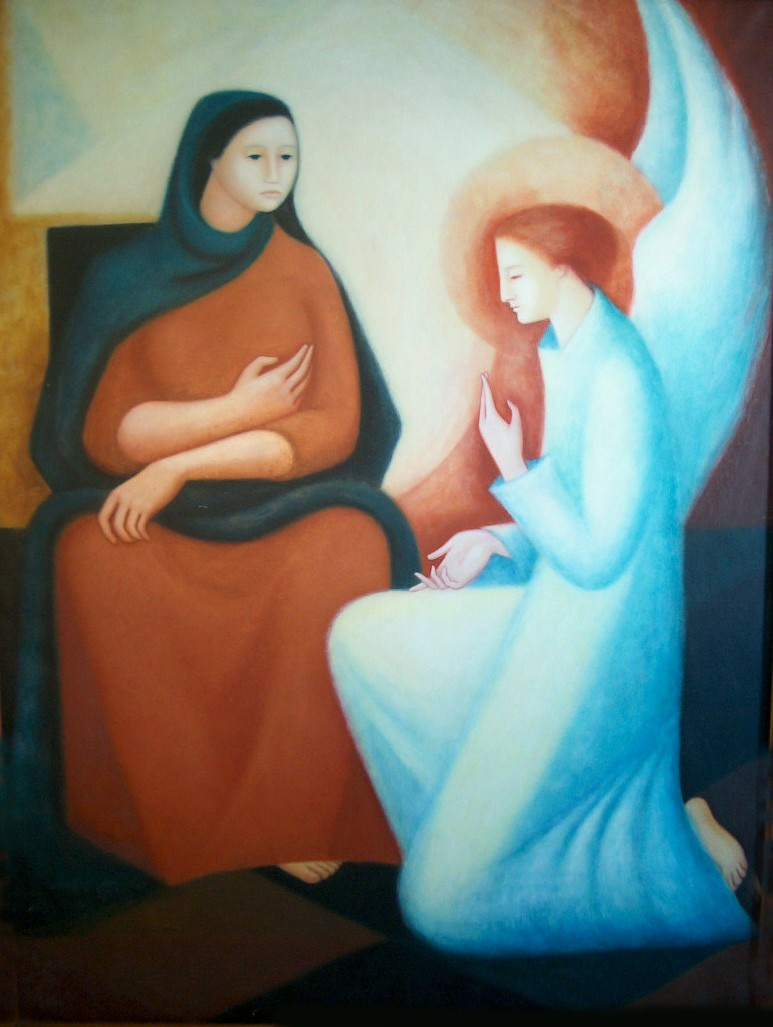 Teresa Sousa (1928-1962), "Anunciação" (1954, pintura, óleo sobre tela, 1500 x 1250 mm)